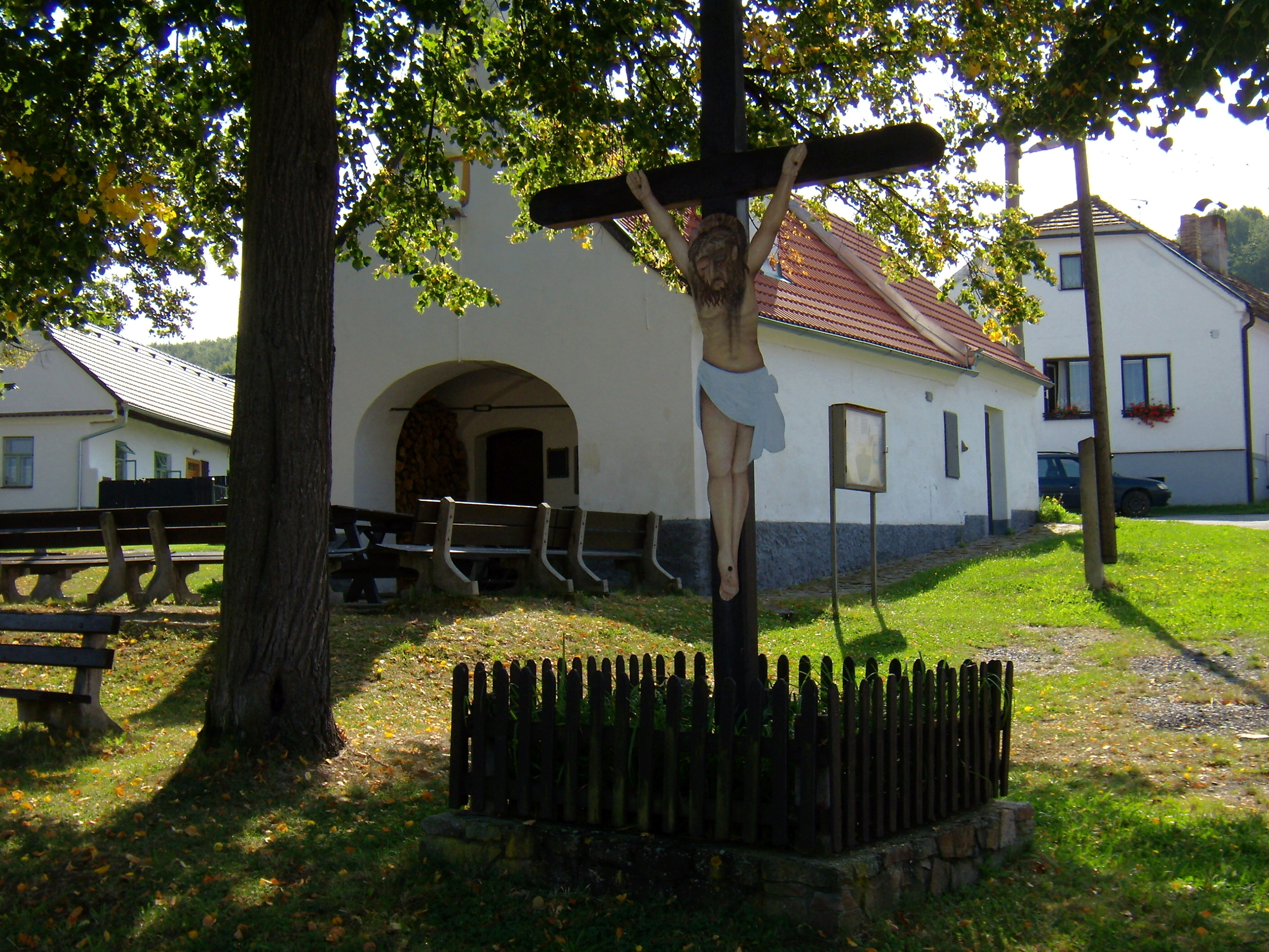 Poněšice - kovárna